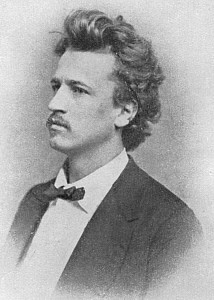 Antonín Vávra (1847–1932) český operní pěvec ND